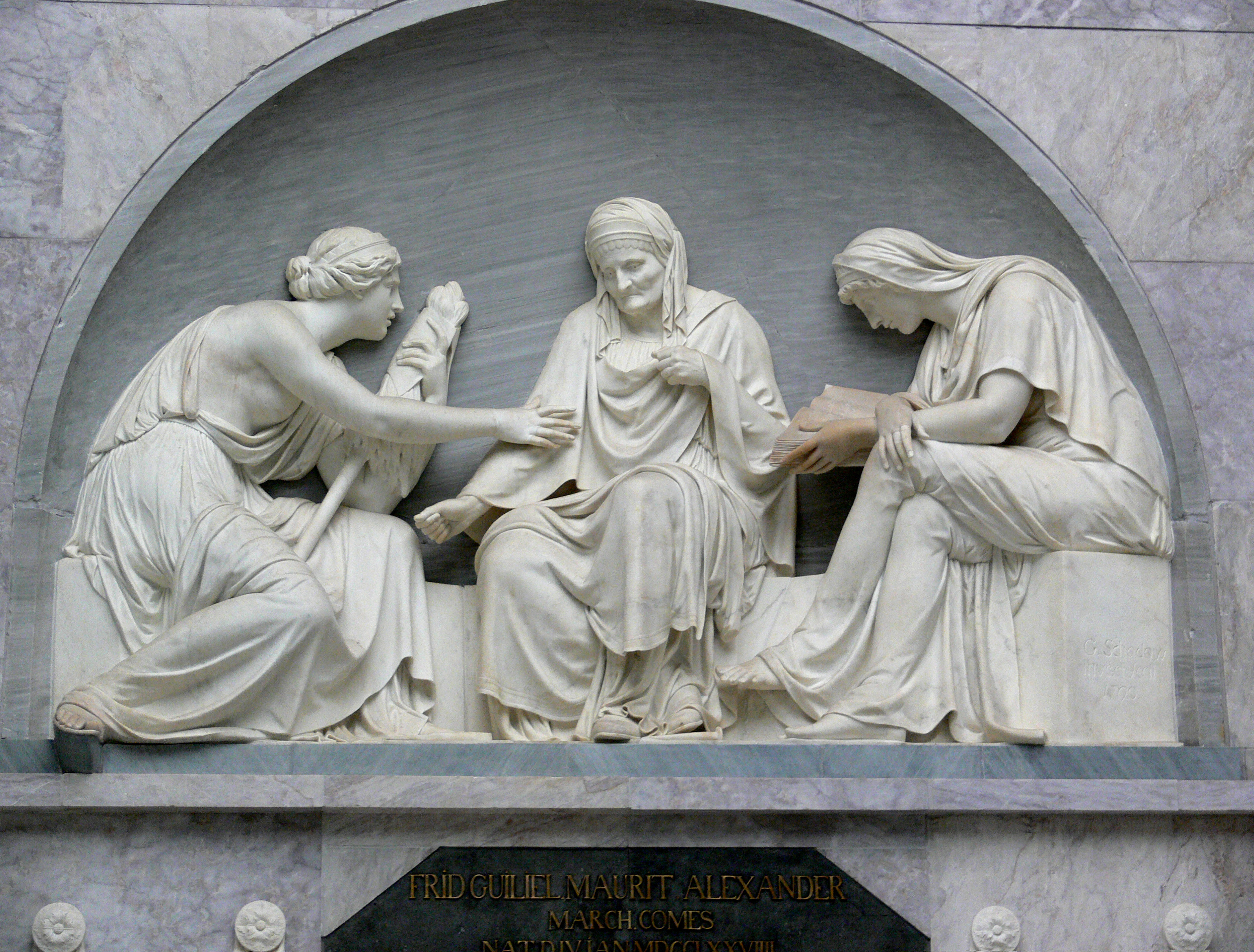 Grabmal des Prinzen Alexander von der Mark; Alte Nationalgalerie Berlin (Leihgabe der evangelischen Kirchengemeinde Friedrichswerder zu Berlin)